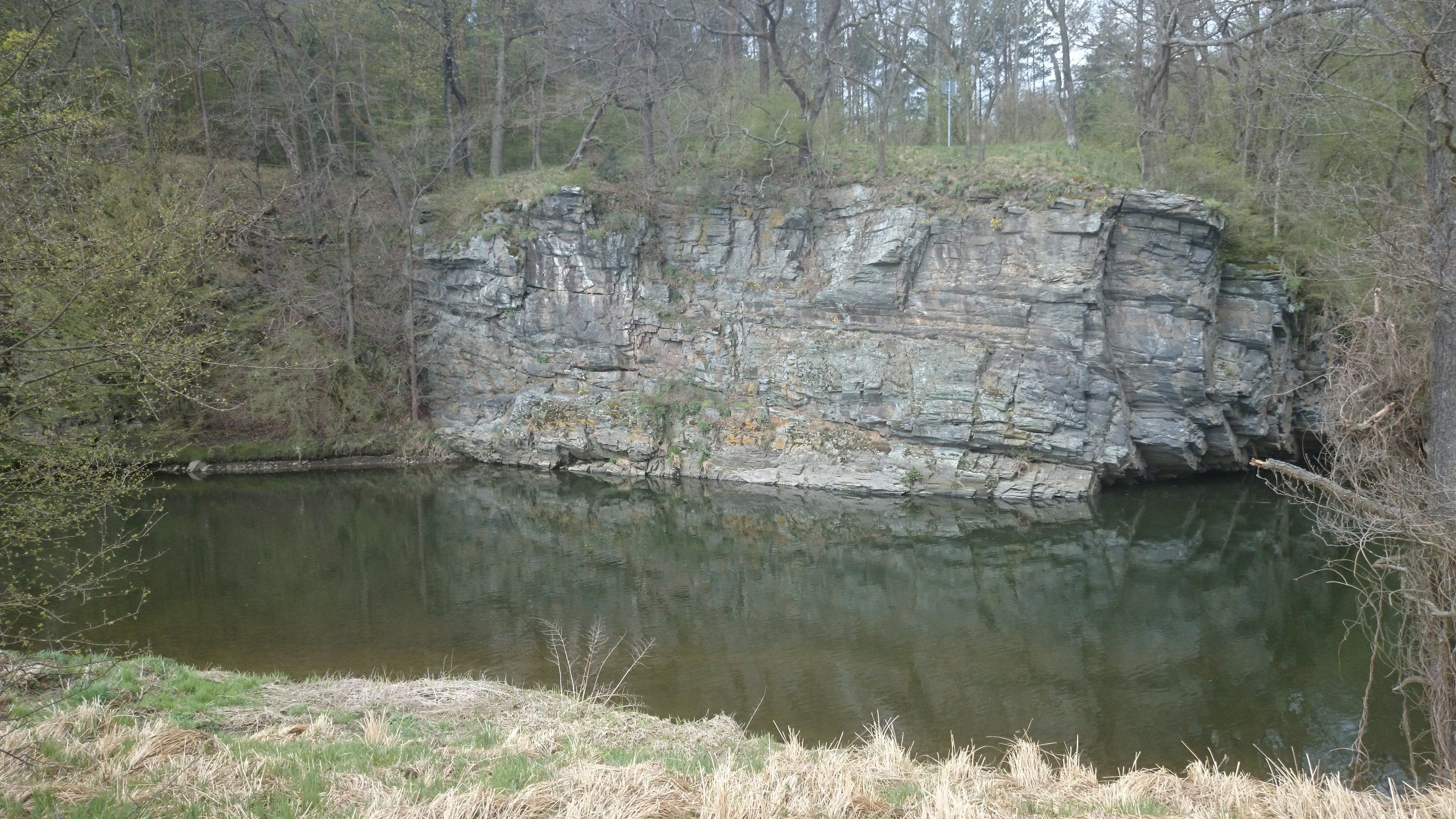 Thayatal-Umlaufberg. Die Thaya umfließt einen Hügel fast gänzlich - hier sieht man den Flußlauf em Ende des Umlaufes. Die Felswand liegt bereits auf tschechischem Staatsgebiet (Grenztafel ist erkennbar) This file shows the National Park Thayatal in Austria.